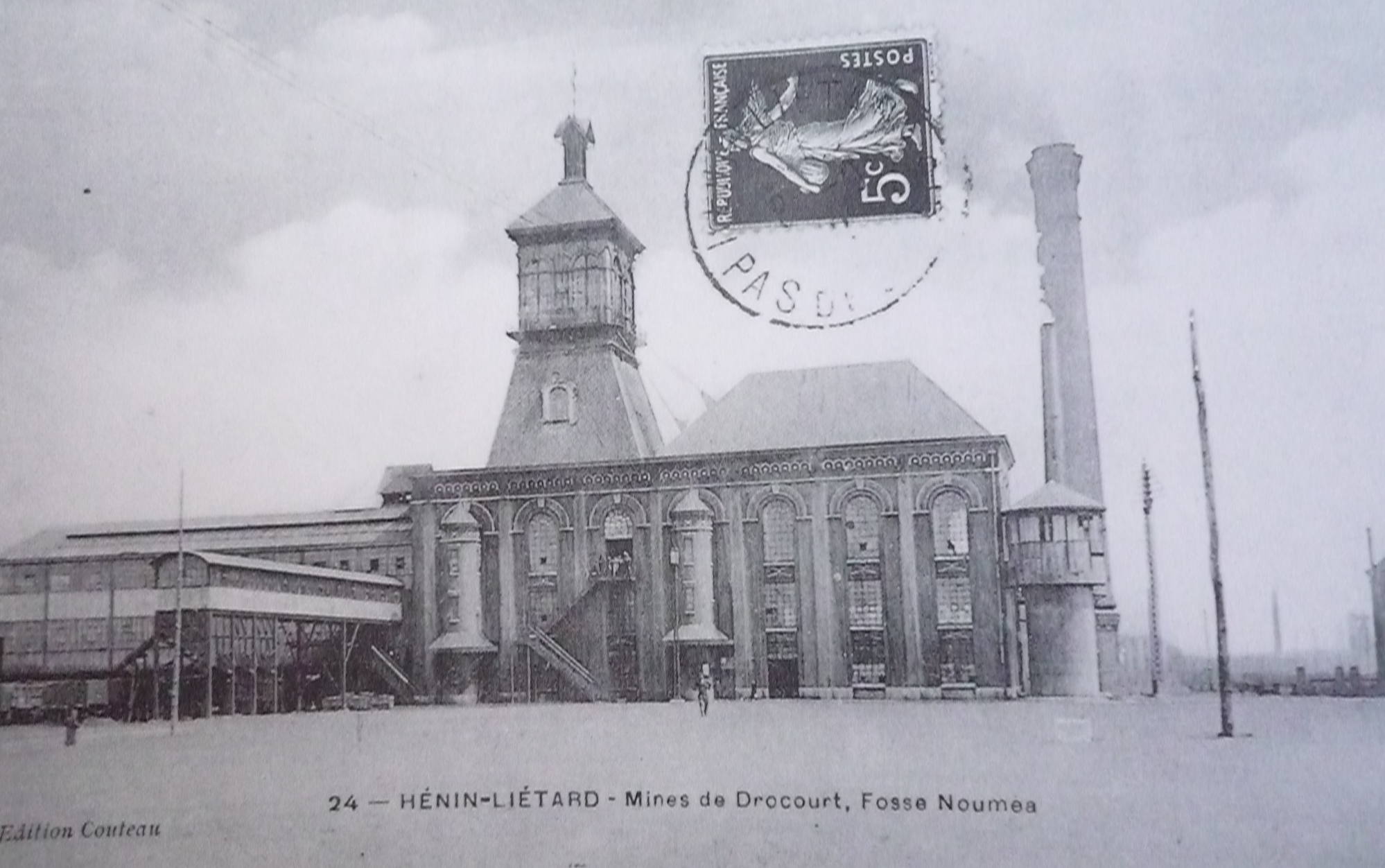 La Fosse n° 2 dite Nouméa de la Compagnie des mines de Drocourt était un charbonnage constitué d'un seul puits situé à Rouvroy, Pas-de-Calais, Nord-Pas-de-Calais, France.